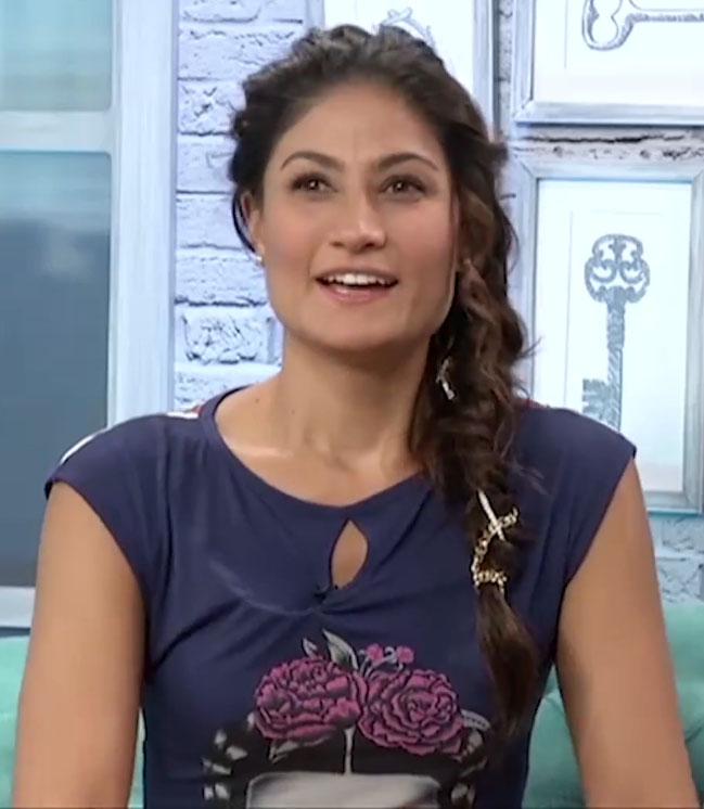 Sachi Tamashiro en una entrevista